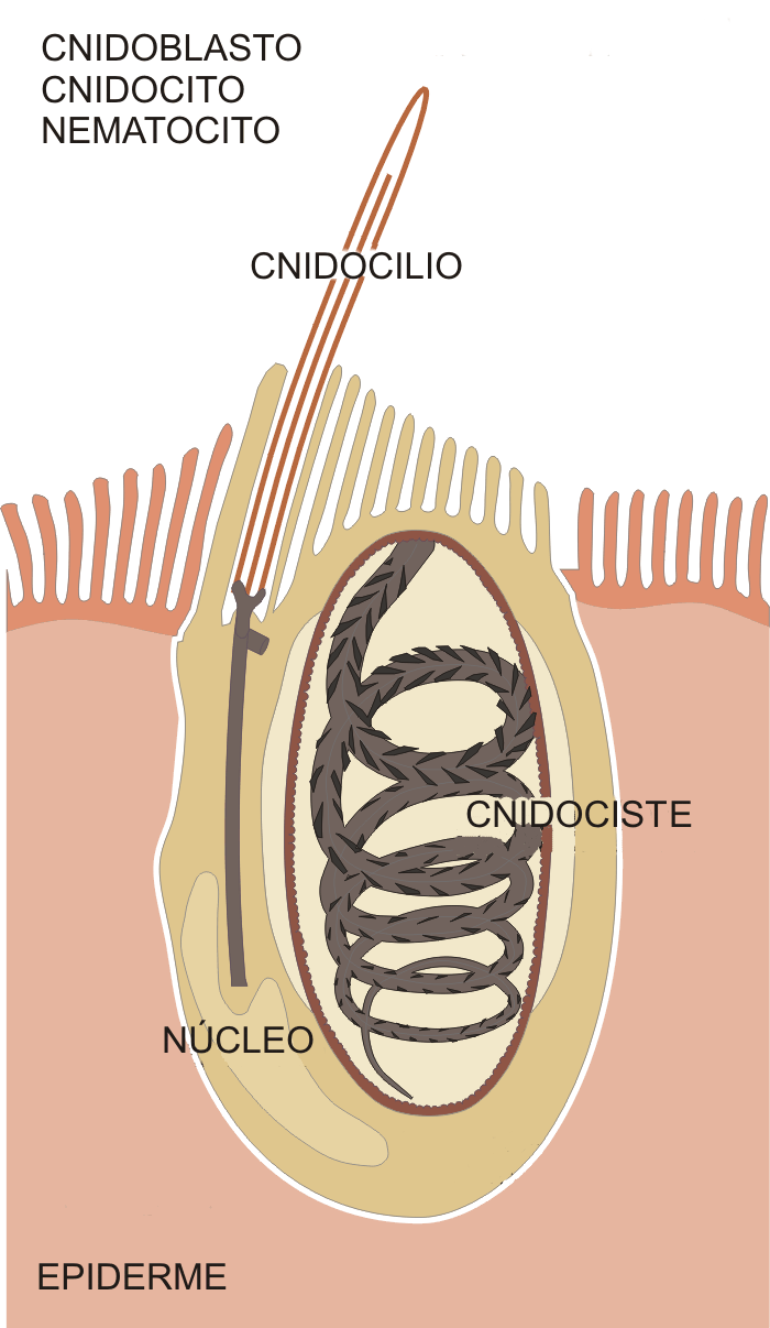 diagrama dun cnidocito